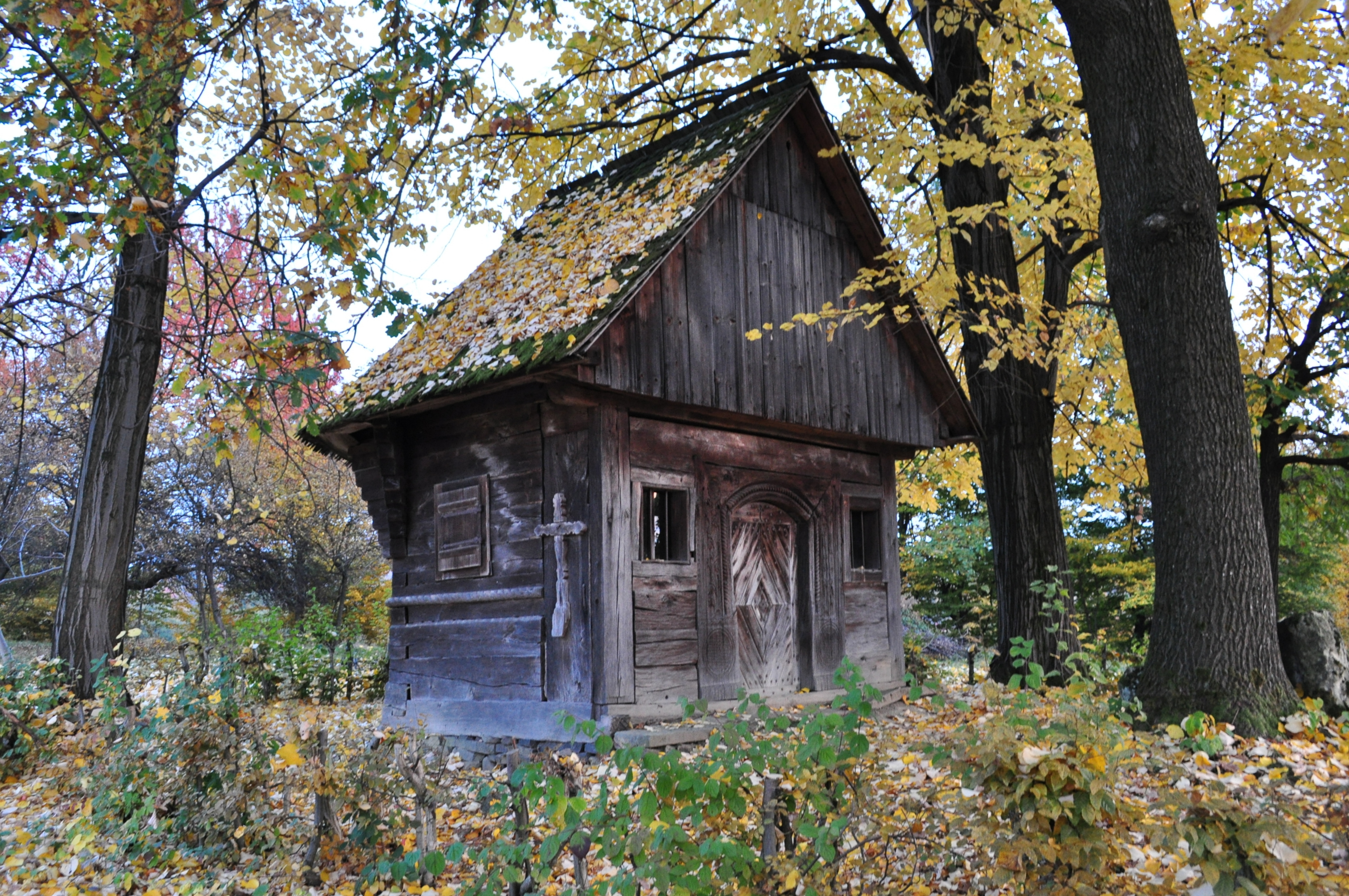 Absida bisericii de lemn, sat Șișești; comuna Șișești, județul Maramureș